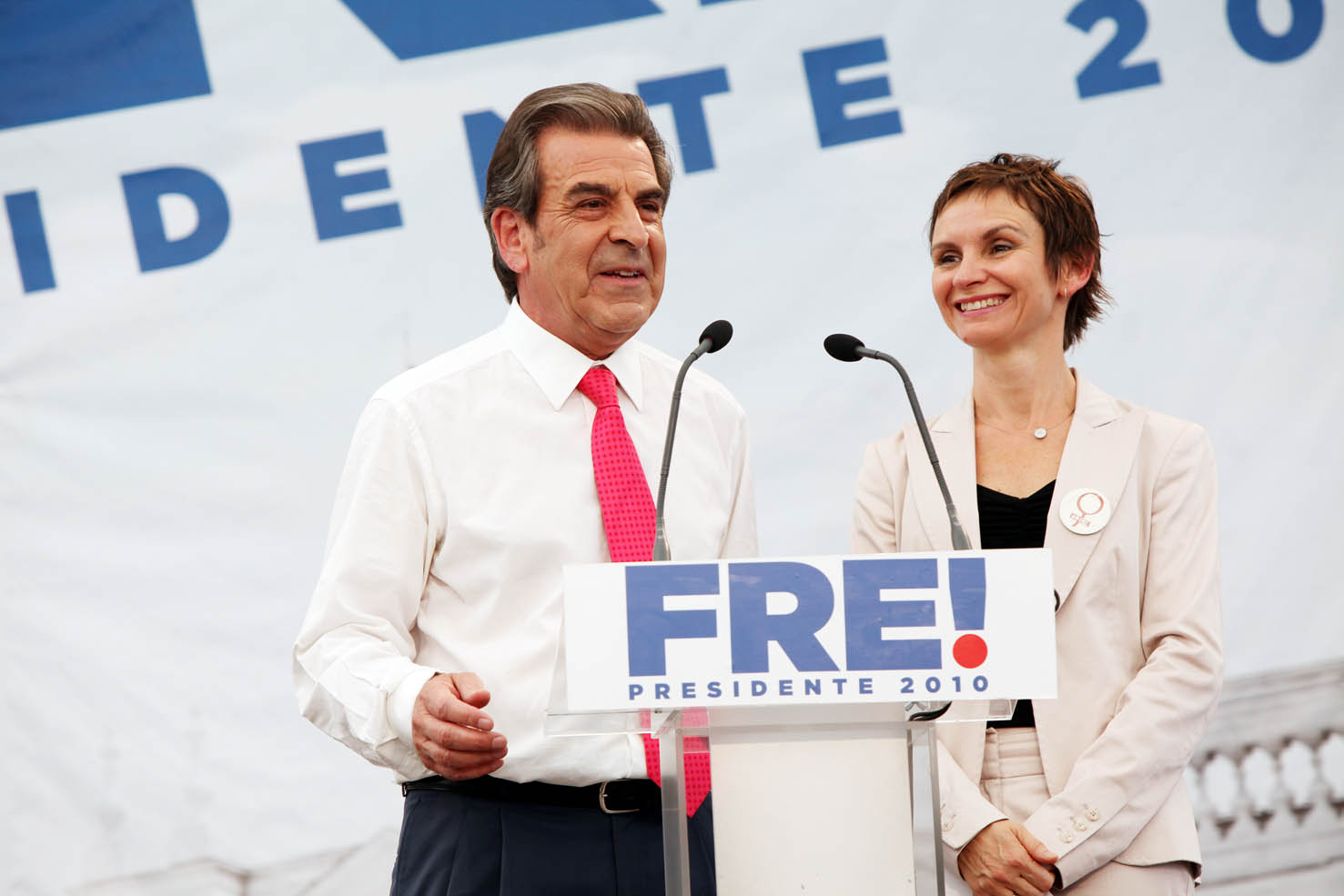 Eduardo Frei Ruiz-Tagle presentó oficialmente a la ex Ministra Carolina Tohá como la nueva jefa de su campaña presidencial, de cara a la segunda vuelta del 17 de enero.